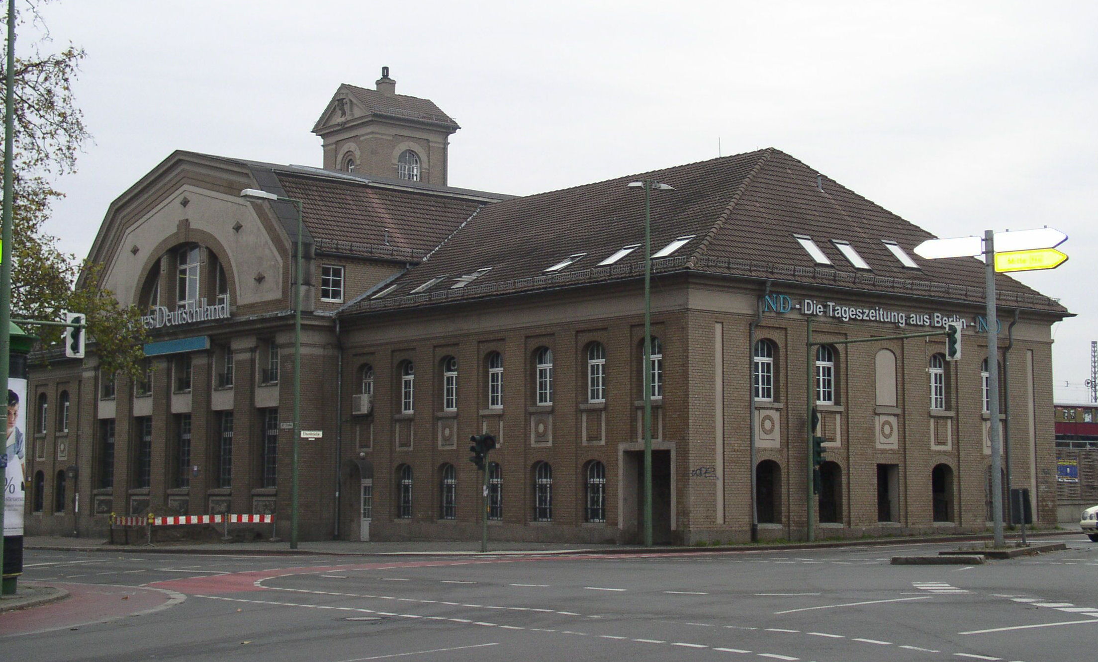 Redaktionsgebäude Neues Deutschland, Osthafen